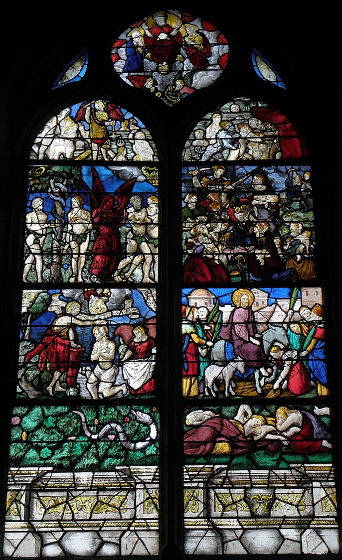 Baie 3 de l'église Saint-Léon de La Baussaine (35).